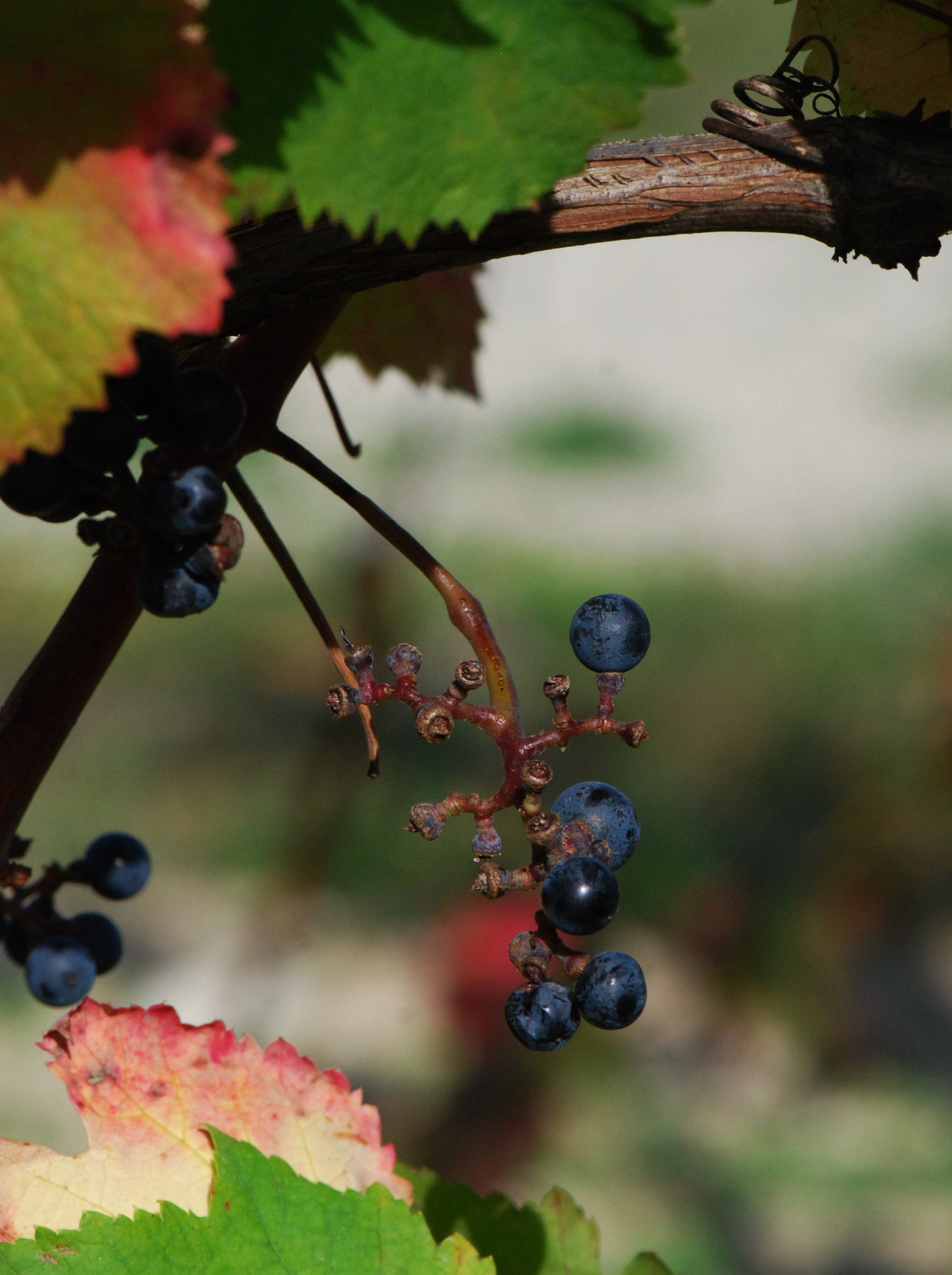 Vitis vinifera subsp. sylvestris, pied femelle avec raisin, conservatoire du vignoble charentais, Cherves 17